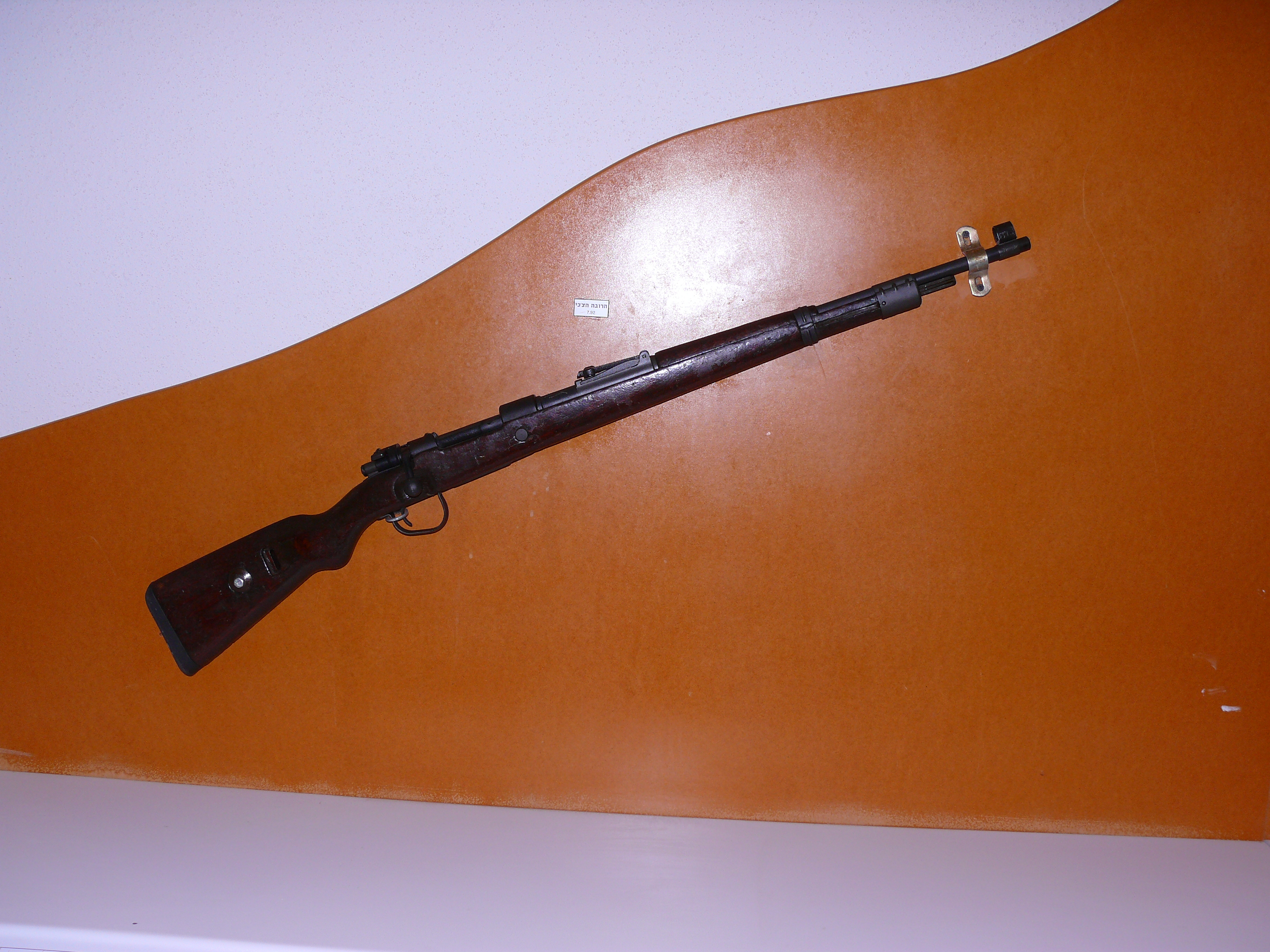 Czech K98 Mauser רובה צ'כי